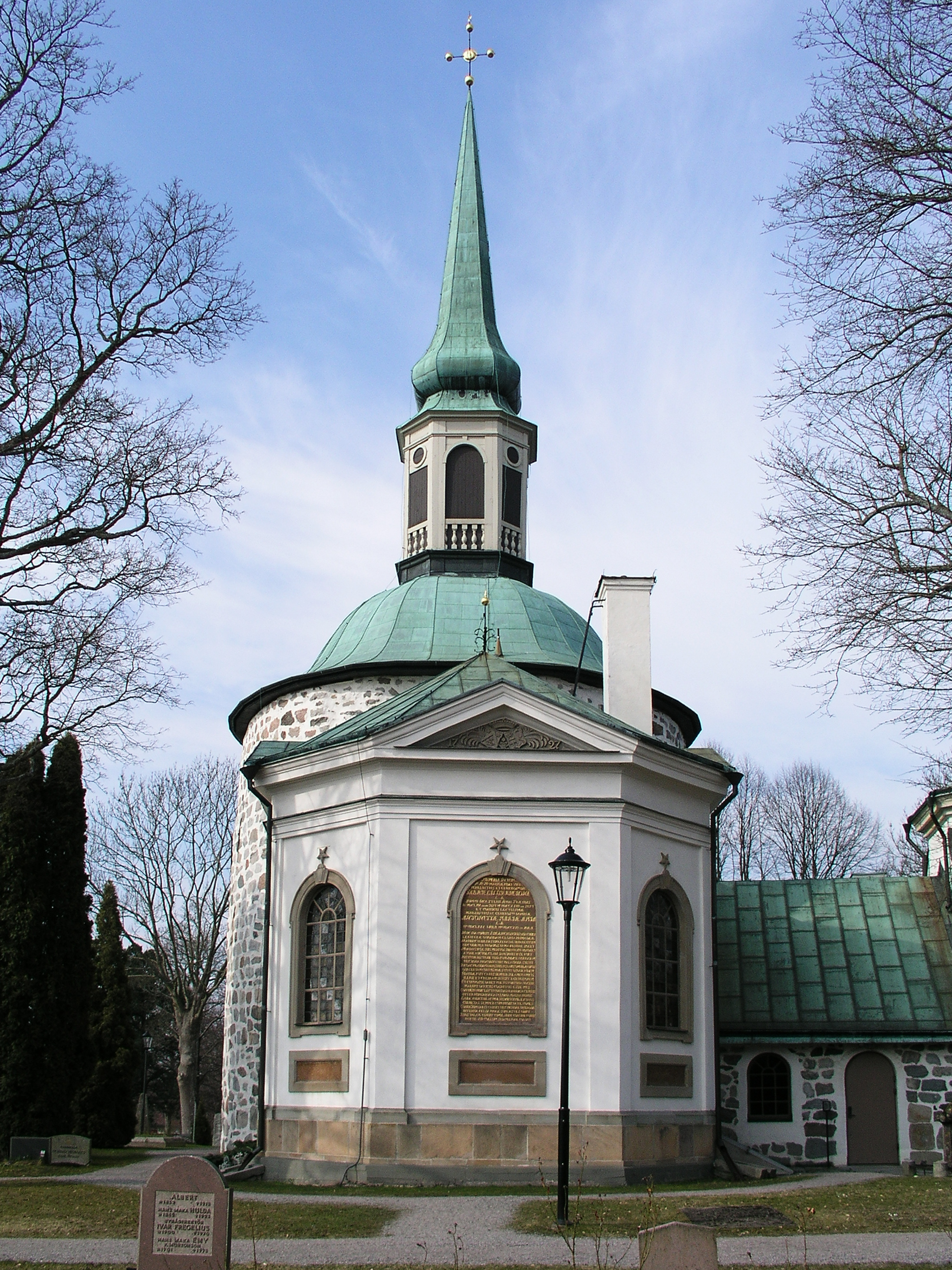 Bromma kyrka/church, Diocese of Stockholm, Sweden.